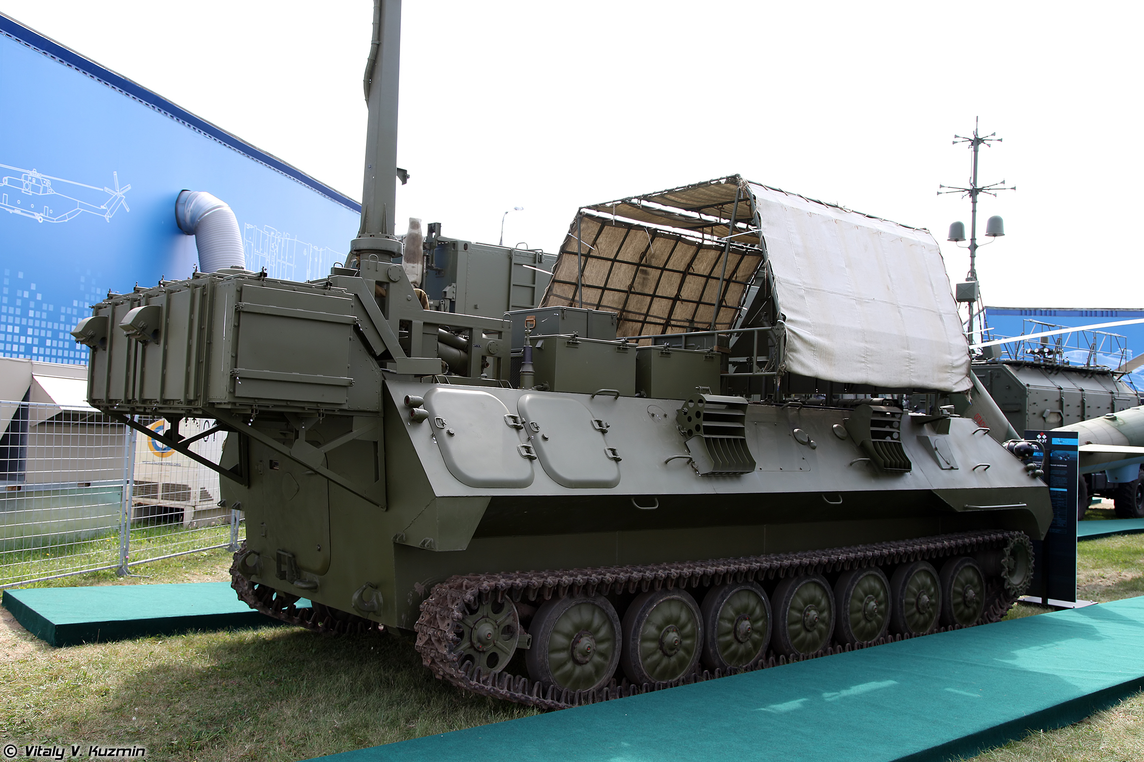 Станция помех 1Л262Э Ртуть-БМ (1L262E Rtut-BM)